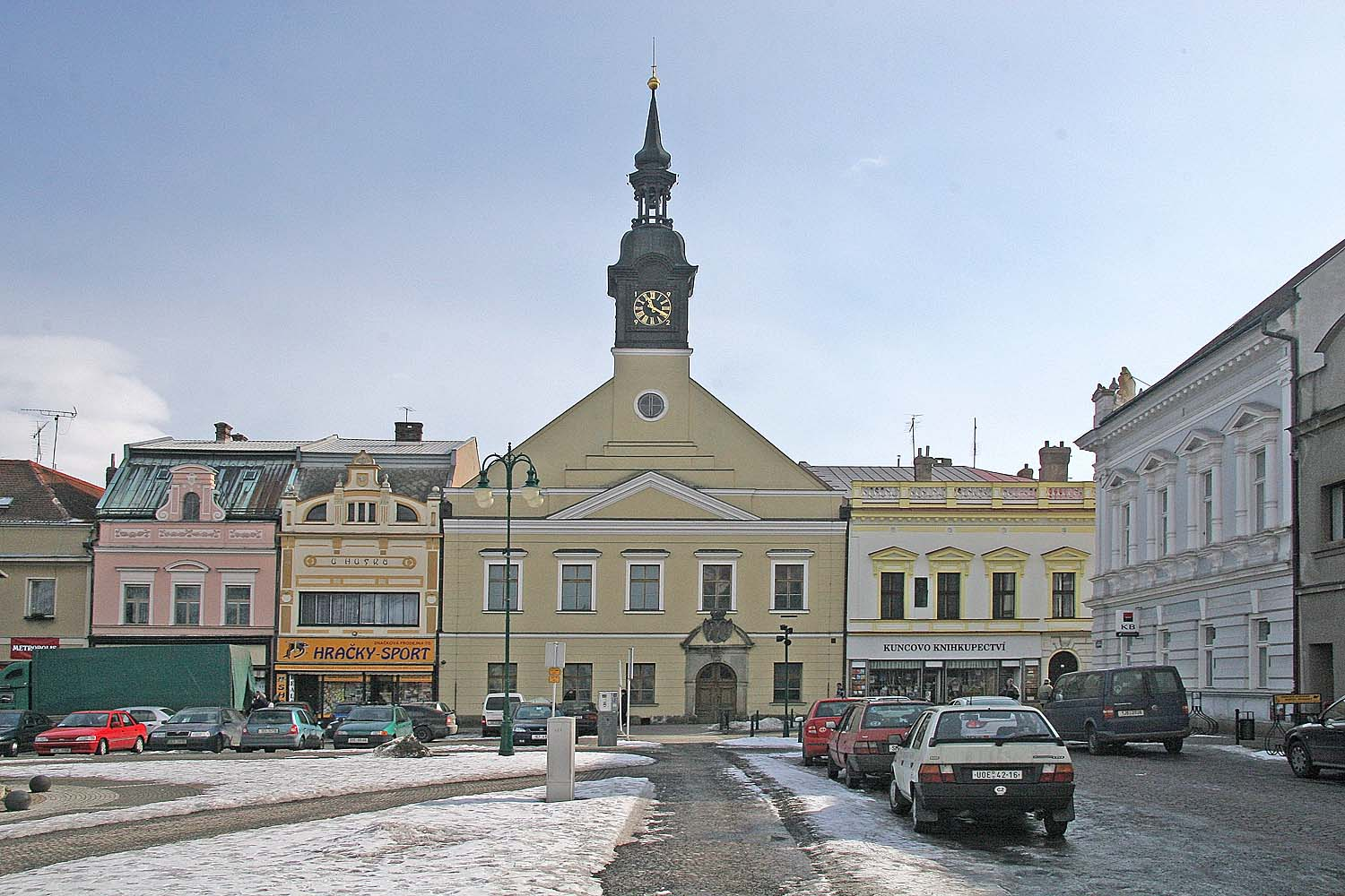 Náměstí Přemysla Otakara II. ve Vysokém Mýtě autor: Jan Prazak mladsi date: 2. 3. 2006